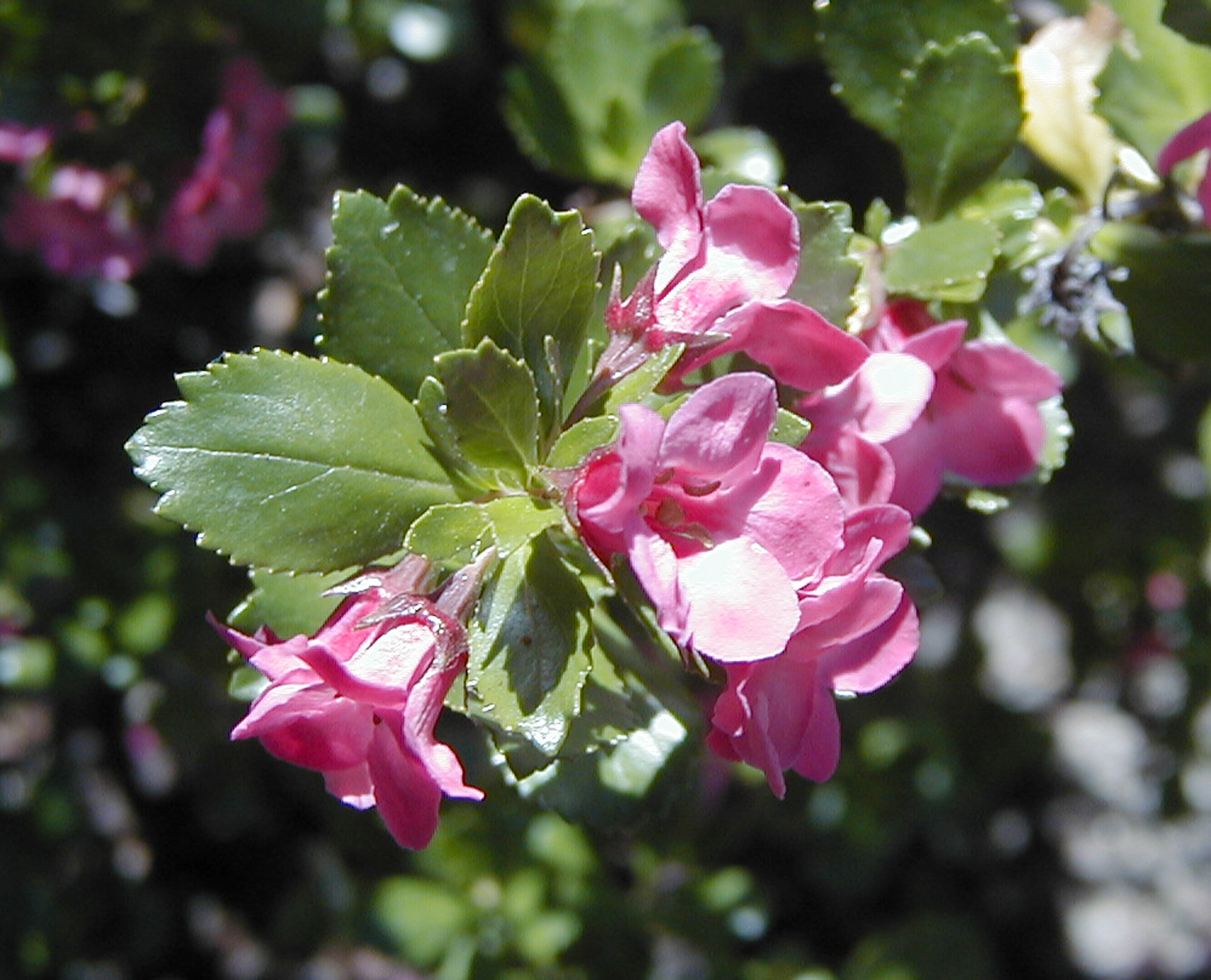 Escallonia macrantha. Real Jardín Botánico, Madrid